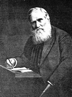 Retrat del matemàtic escocès Thomas Bond Sprague (1830-1920)